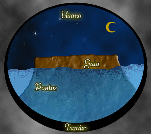 No início havia o Caos. Desse caos primordial surgiu Gaia (personificação da terra), Tártaro (o inferno para os gregos) e Eros (o amor). Gaia, sem intervenção masculina, gerou as Montanhas, Pontos (o mar) e Urano (o céu), desposando este último, fazendo assim a primeira união divina. Desta união nasceram os Ciclopes, os Hecatonquiros e os Titãs. Na Mitologia Grega, cada entidade física ou abstrata da natureza, podia ser explicada através da ação de um deus característico.